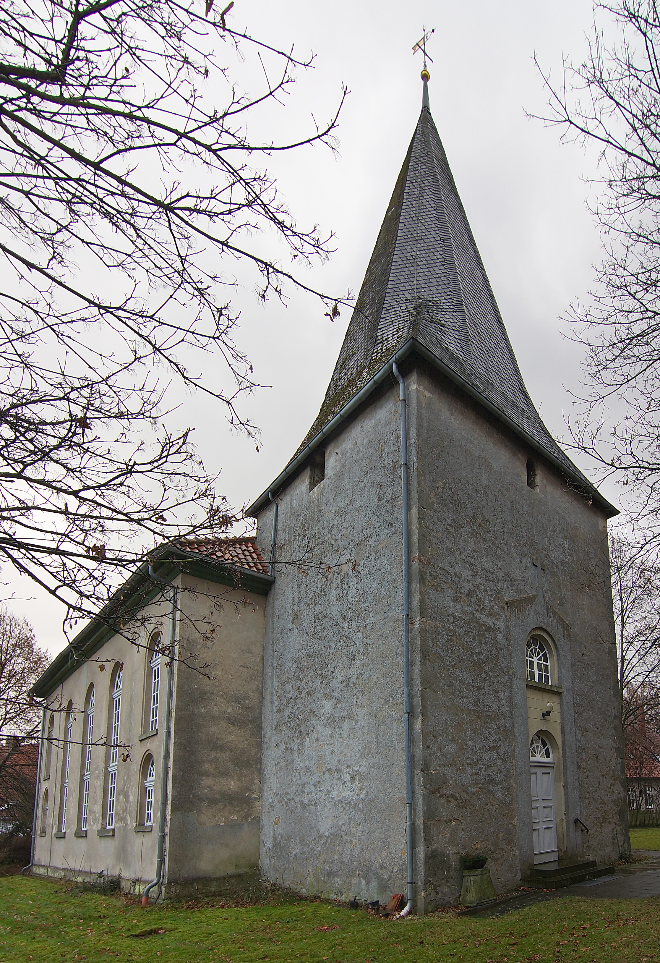 Die 1839 geweihte St.-Bernward-Kirche in Eddesse (Edemissen) ersetzte die wegen Baufälligkeit im ersten Drittel des 19. Jahrhunderts gesperrte Vorgängerkirche.